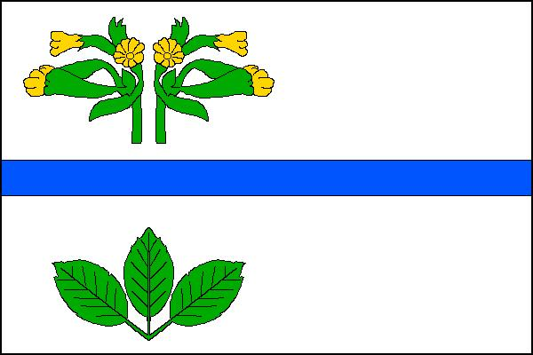 Vlajka obce Bukovice